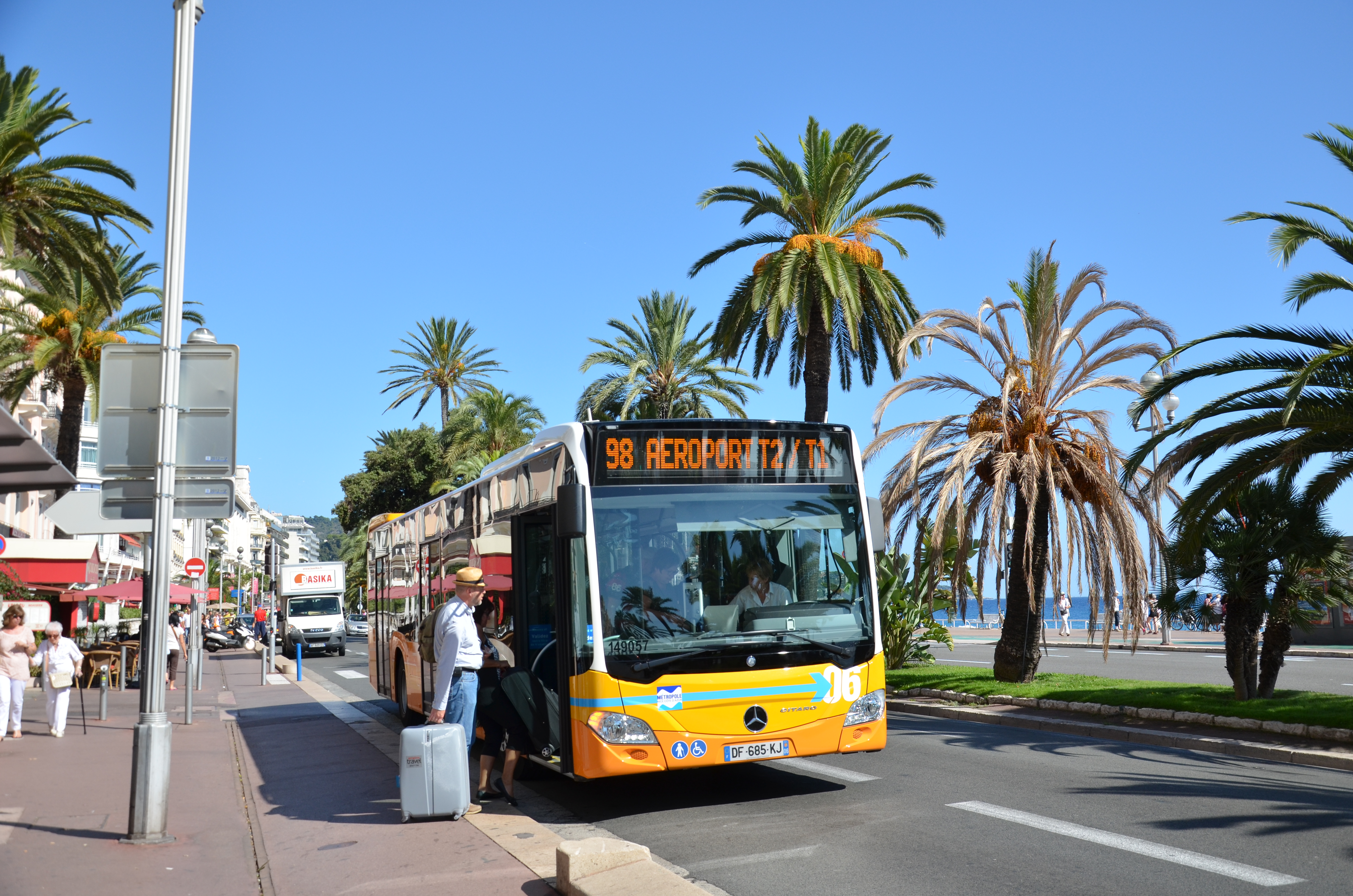 Mercedes Citaro C2 n°149057 sur la Promenade des Anglais de Nice à l'arrêt Congrès Promenade, sur la ligne 98 reliant Nice à l'aéroport Nice Côte d'Azur.